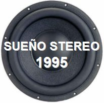 Tapa de disco